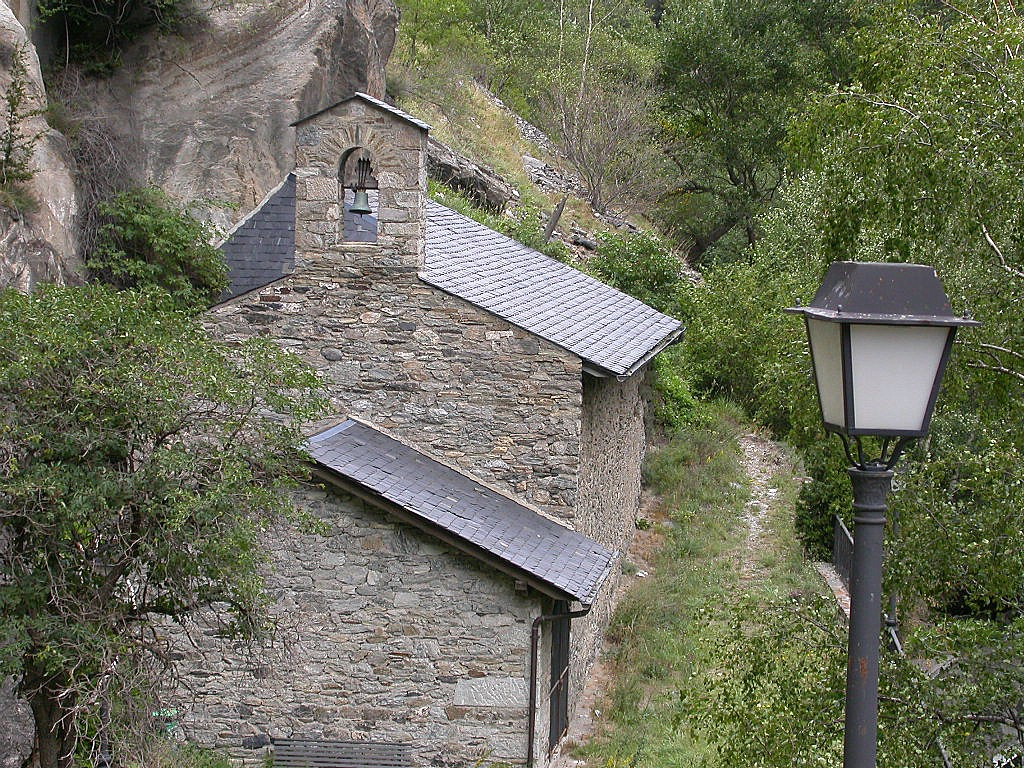 Andorra Església de Sant Antoni de la Grella